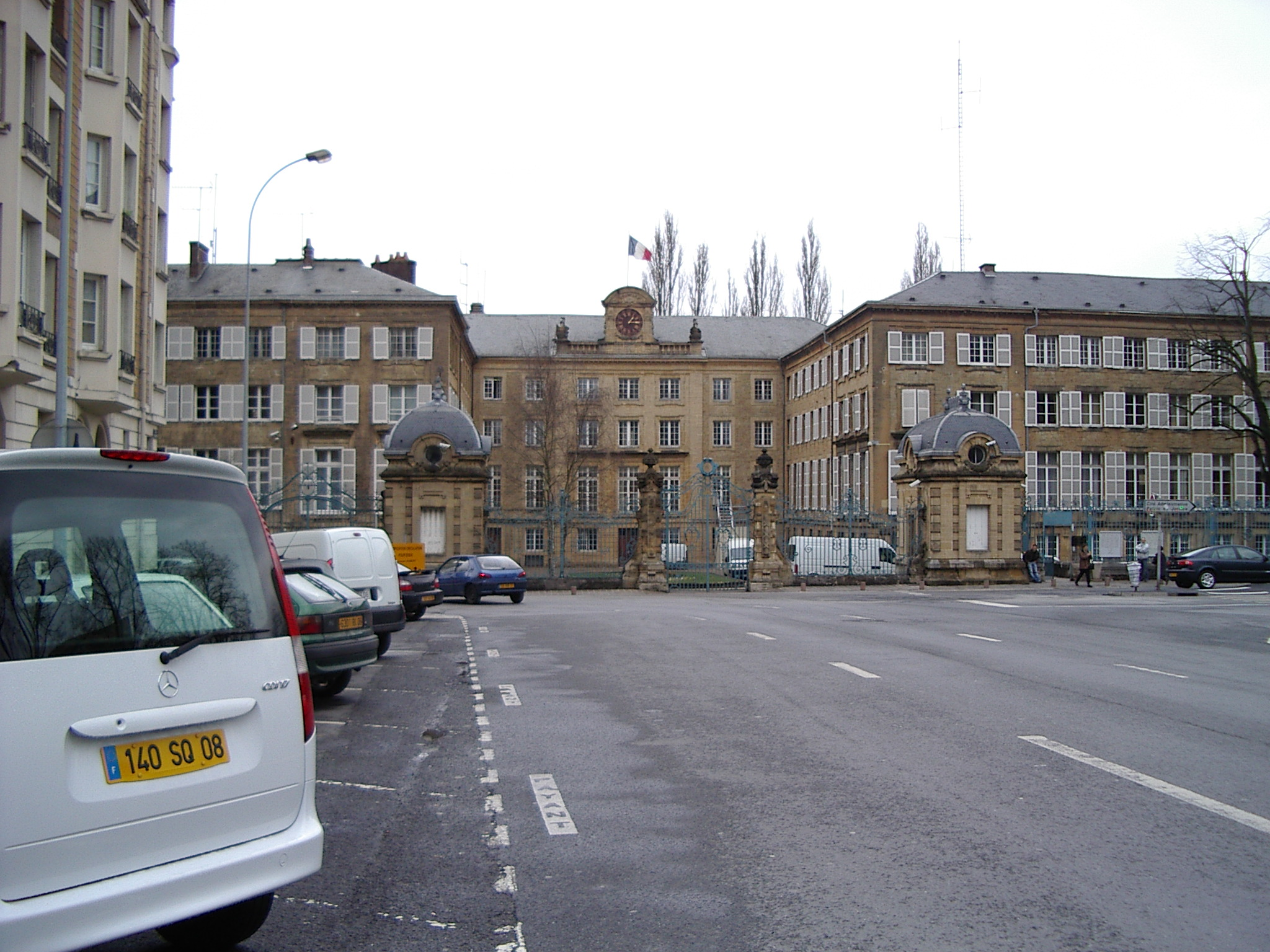 Hôtel du département Charleville-Mézières Ardennes France